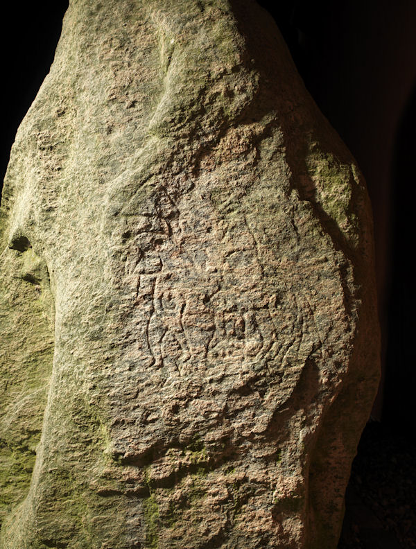 Foto: nationalmuseet ved Roberto Fortuna